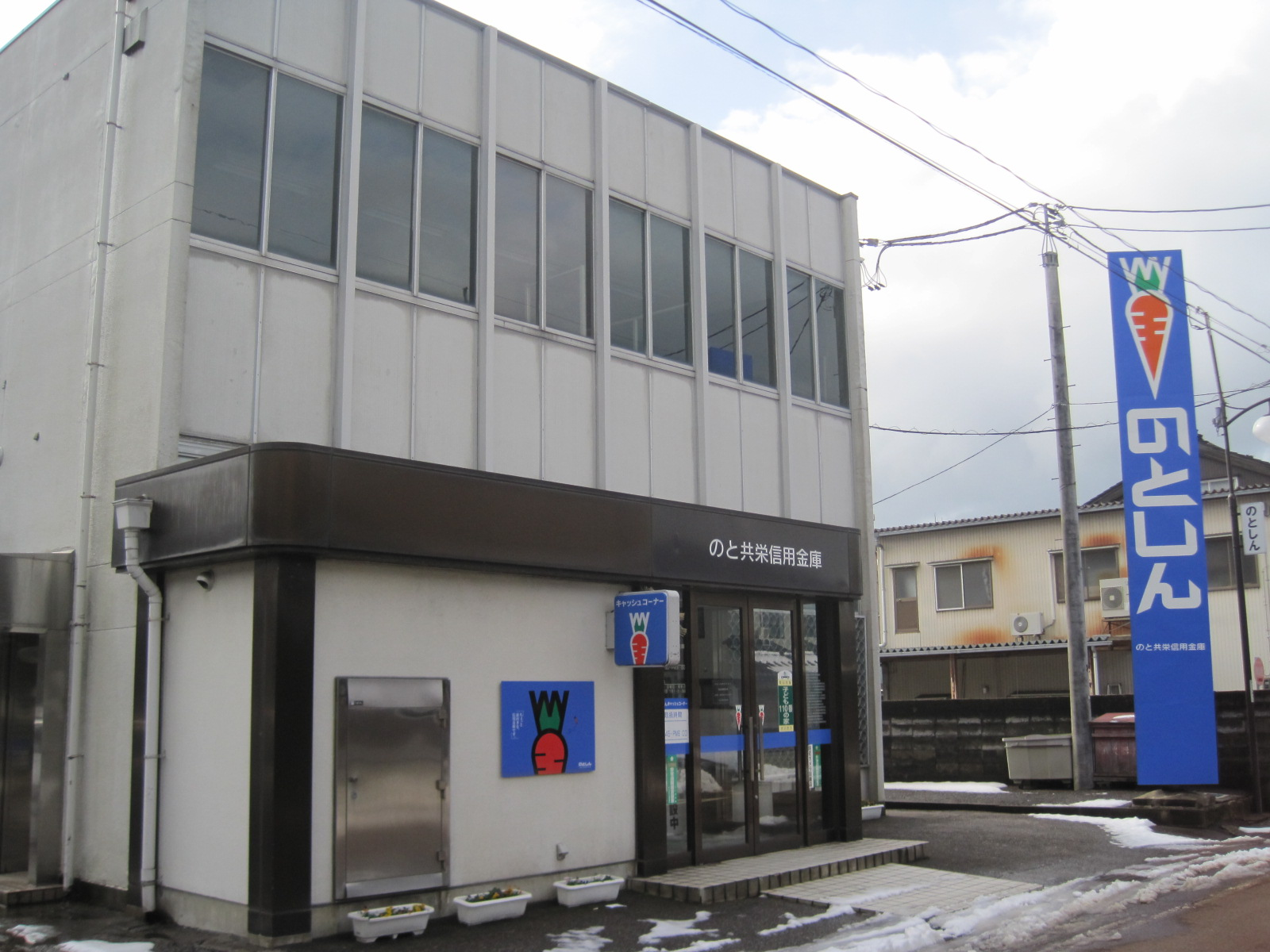 のと共栄信用金庫志雄支店（石川県羽咋郡宝達志水町）